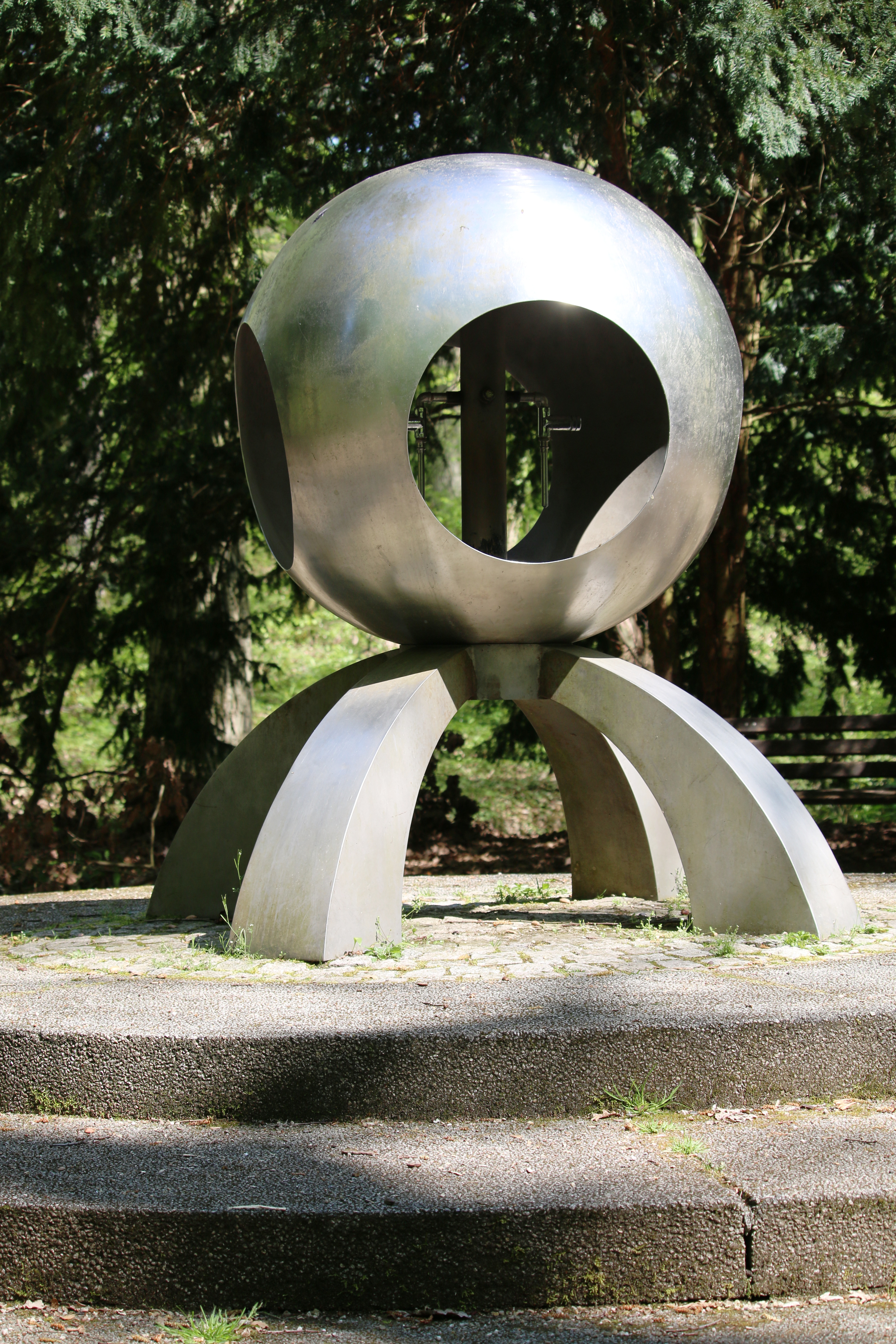 Schwefelquelle Östringen im Krummbachwald